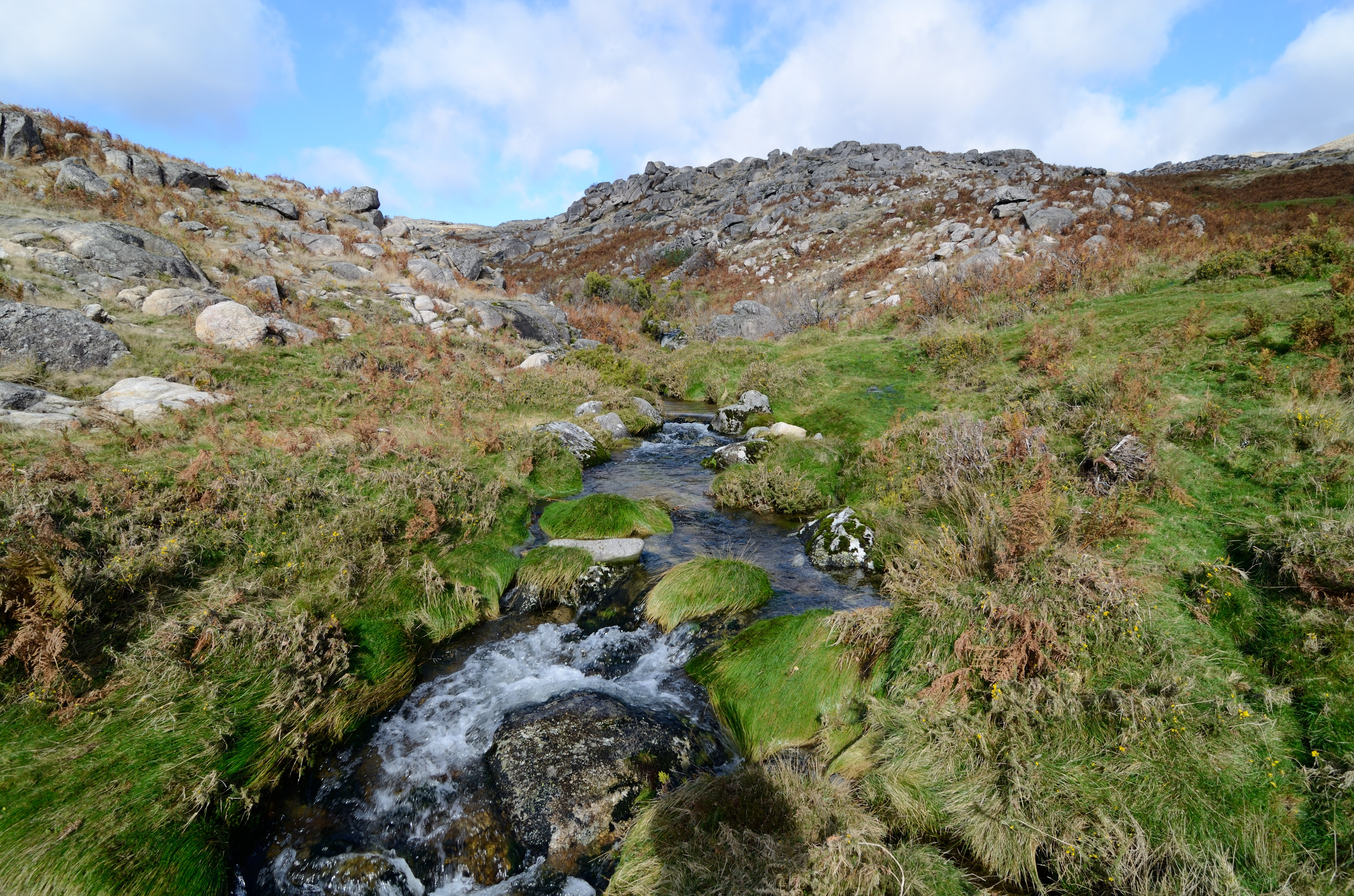 Brufe, Terras de Bouro, Portugal [2012]